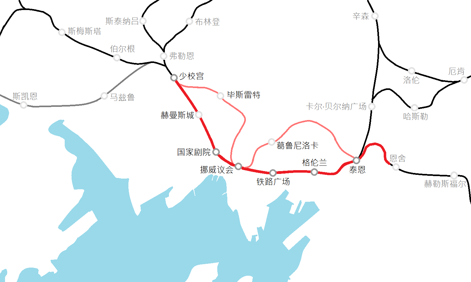 共用隧道的未来地图。红色路线表示共用隧道、粉红色线表示新隧道、灰线表示未来计画中路线（福尼布线）。